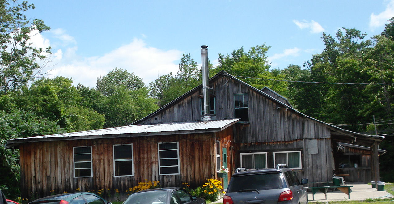 Cabane à sucre des environs de Montréal